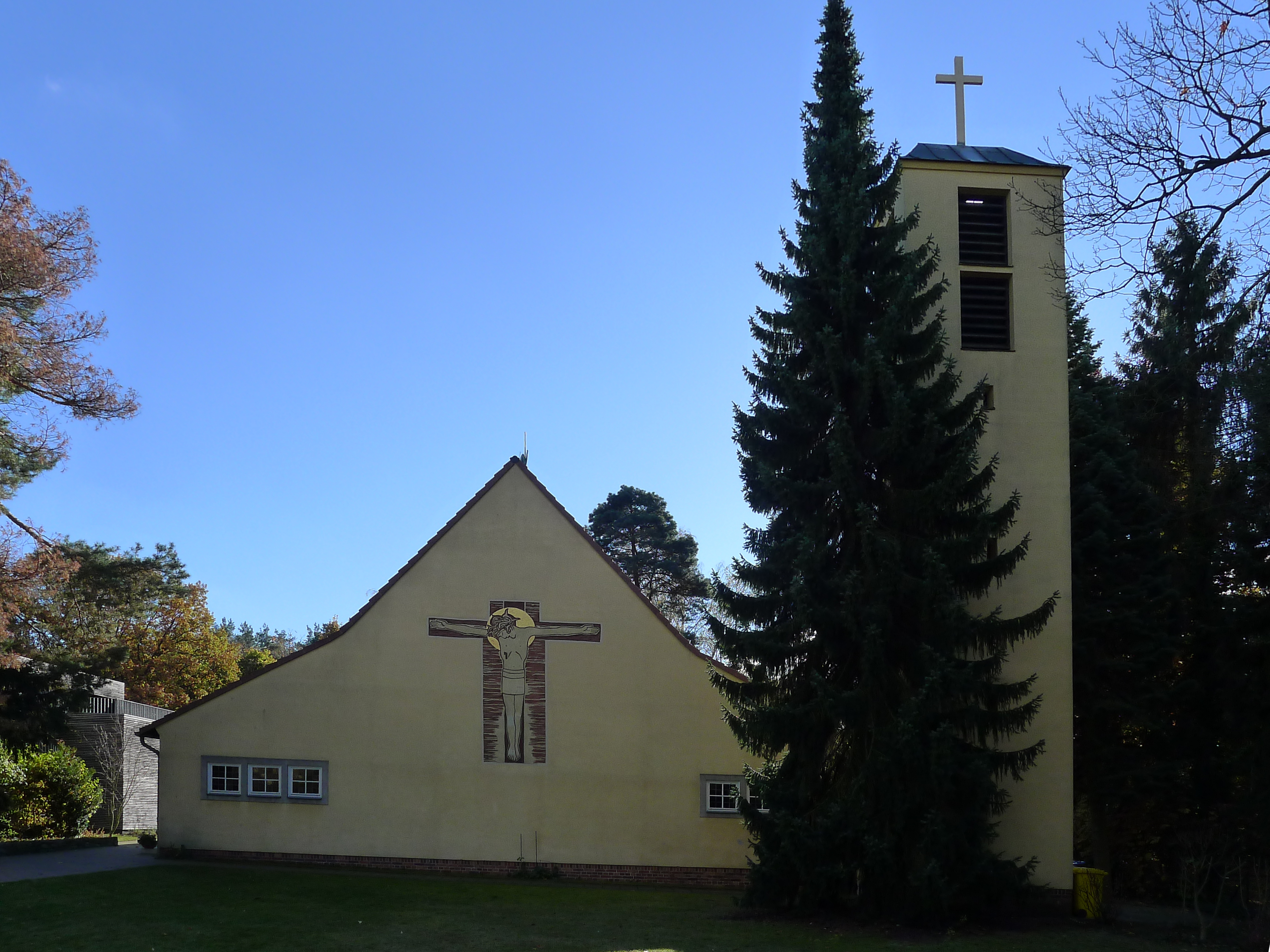 Blick von der Tannenbergallee auf die Kirche